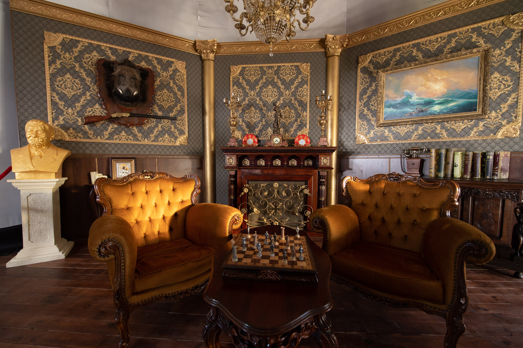 Зала всередині нагадує кабінет або кімнату, в якій розташовані речі та предмети розкоші, якими оточують себе корупціонери.